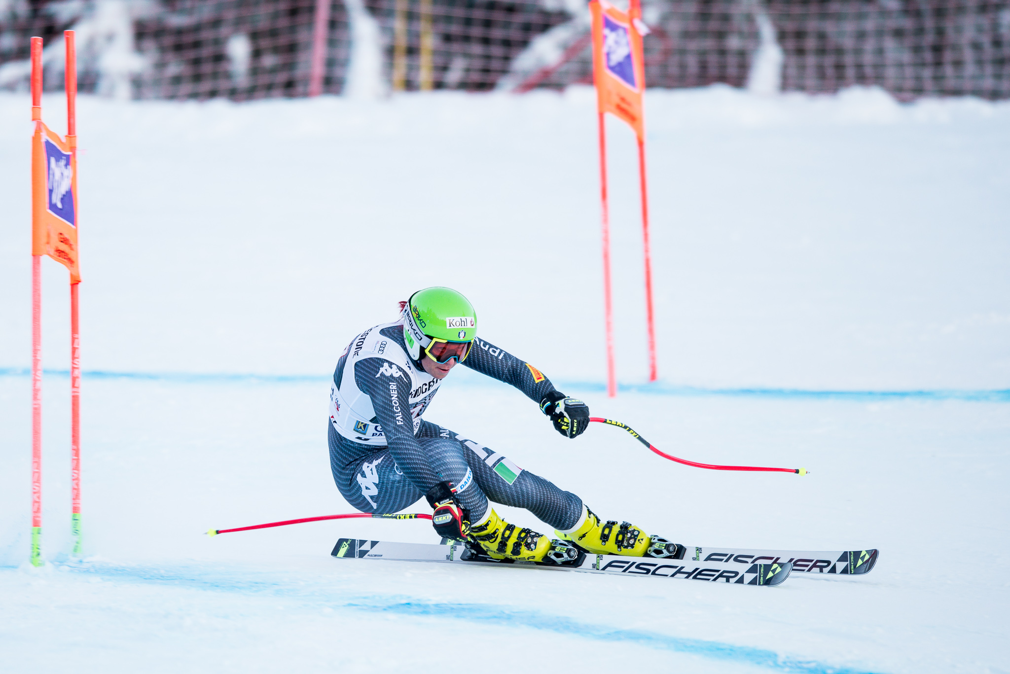 64. Kandahar Rennen,Audi FIS Ski Weltcup Garmisch-Partenkirchen,Damen Abfahrt,Johanna Schnarf,Kandahar,Ladies Downhill